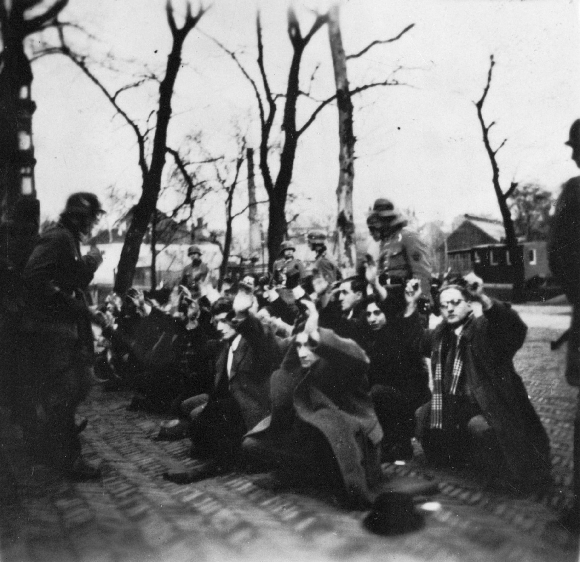 Duitse razzia op het Jonas Daniël Meijerplein te Amsterdam / Foto van een foto van een groep mannen op hun knieën, bewaakt door Duitse soldaten